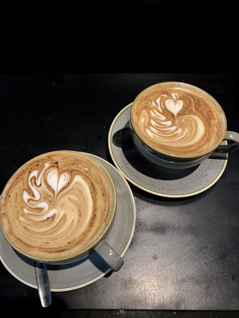 Latte Art on a Cappuccino